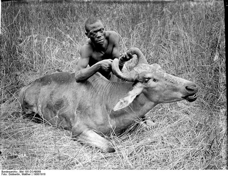 Kongoni, Kuhantilope